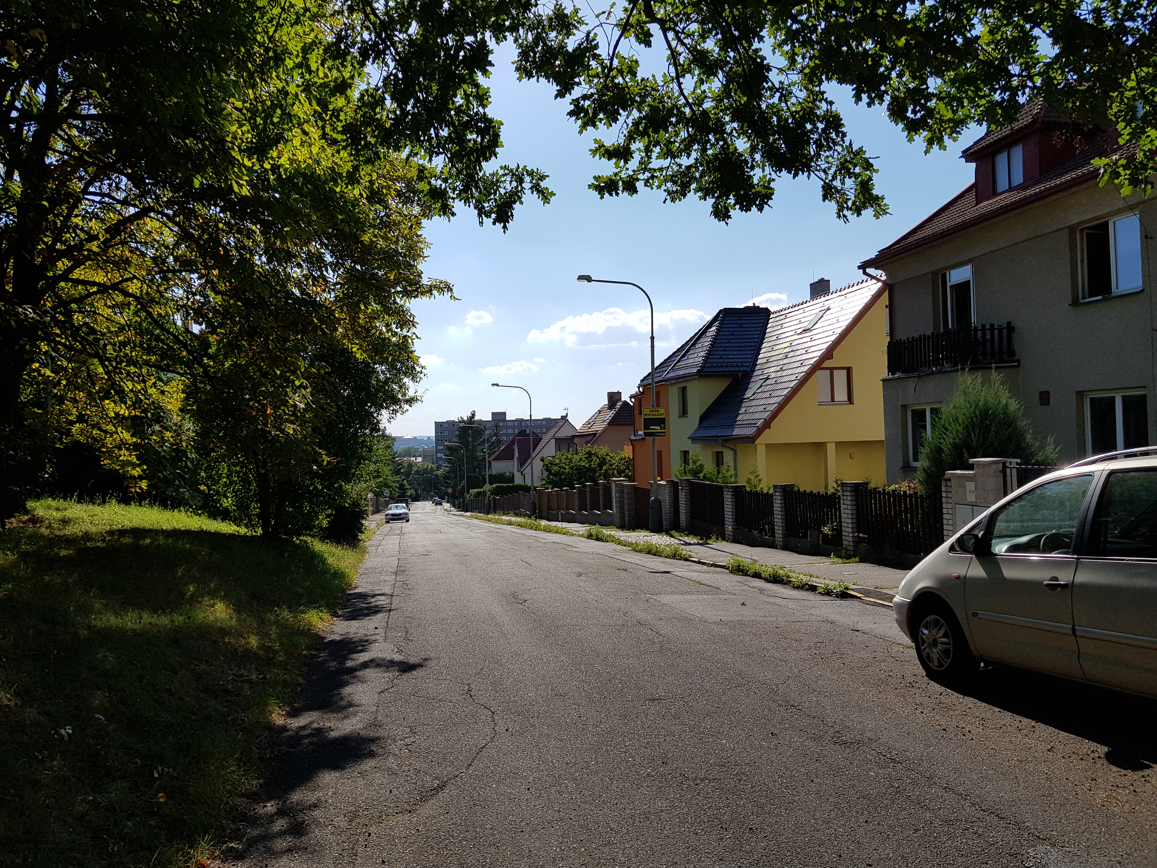 Vaňkova ulice, Praha 14-Hloubětín, pohled od ulice V Chaloupkách na západ